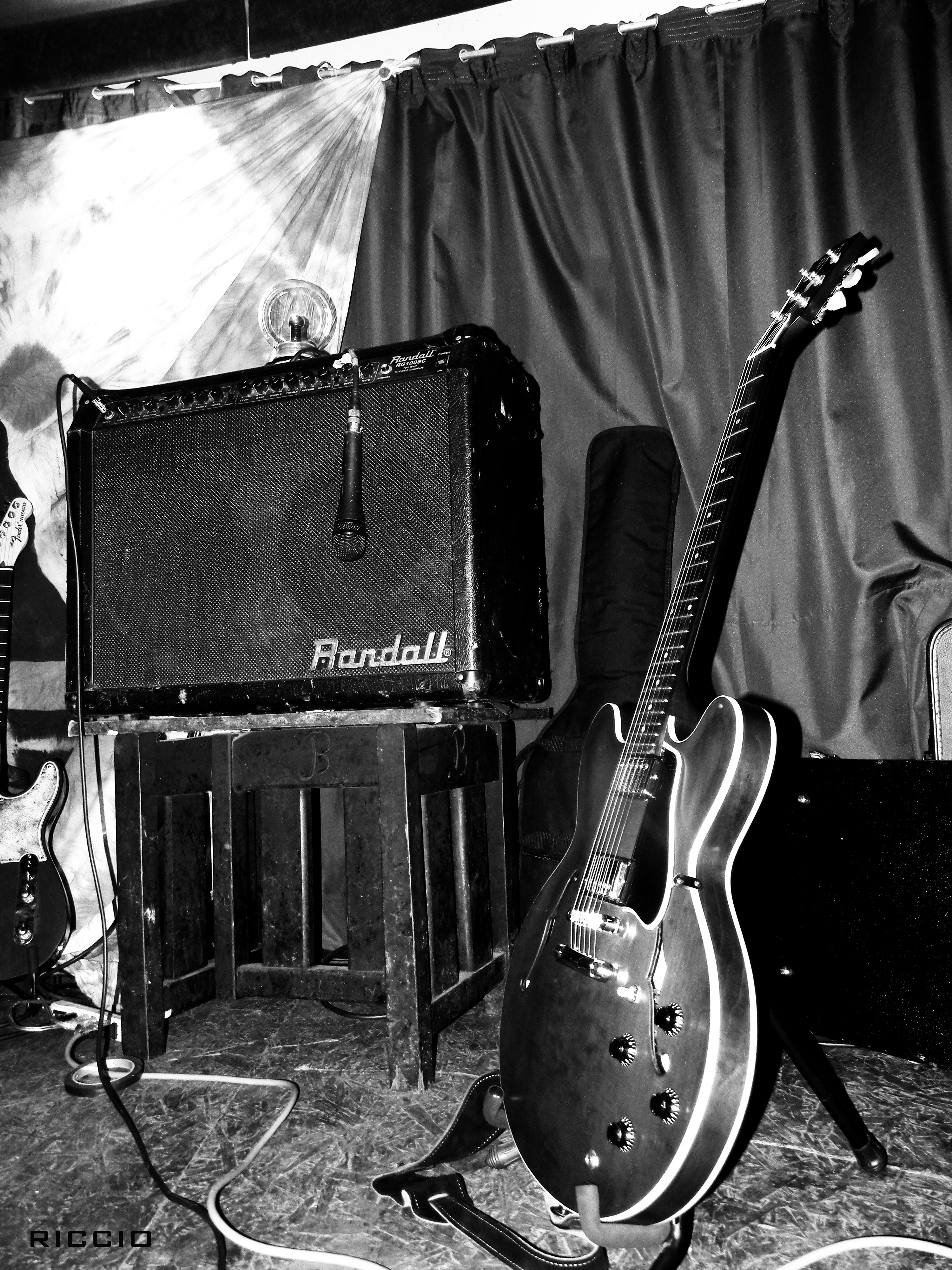 Gibson es-335 Flickr Tags: gibson es-335 semi-hollow randall toque concert meson del metro dominoes B&W blanco y negro gig rock music indie FAU UCV arquitectura carlos raul villanueva facultad de concreto luz architecture arte vida universidad central venezuela ciudad universitaria caracas guitar guitarra red.